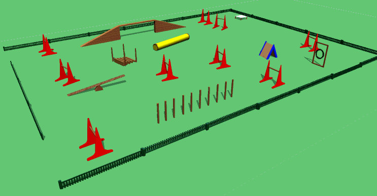 Agility Partur